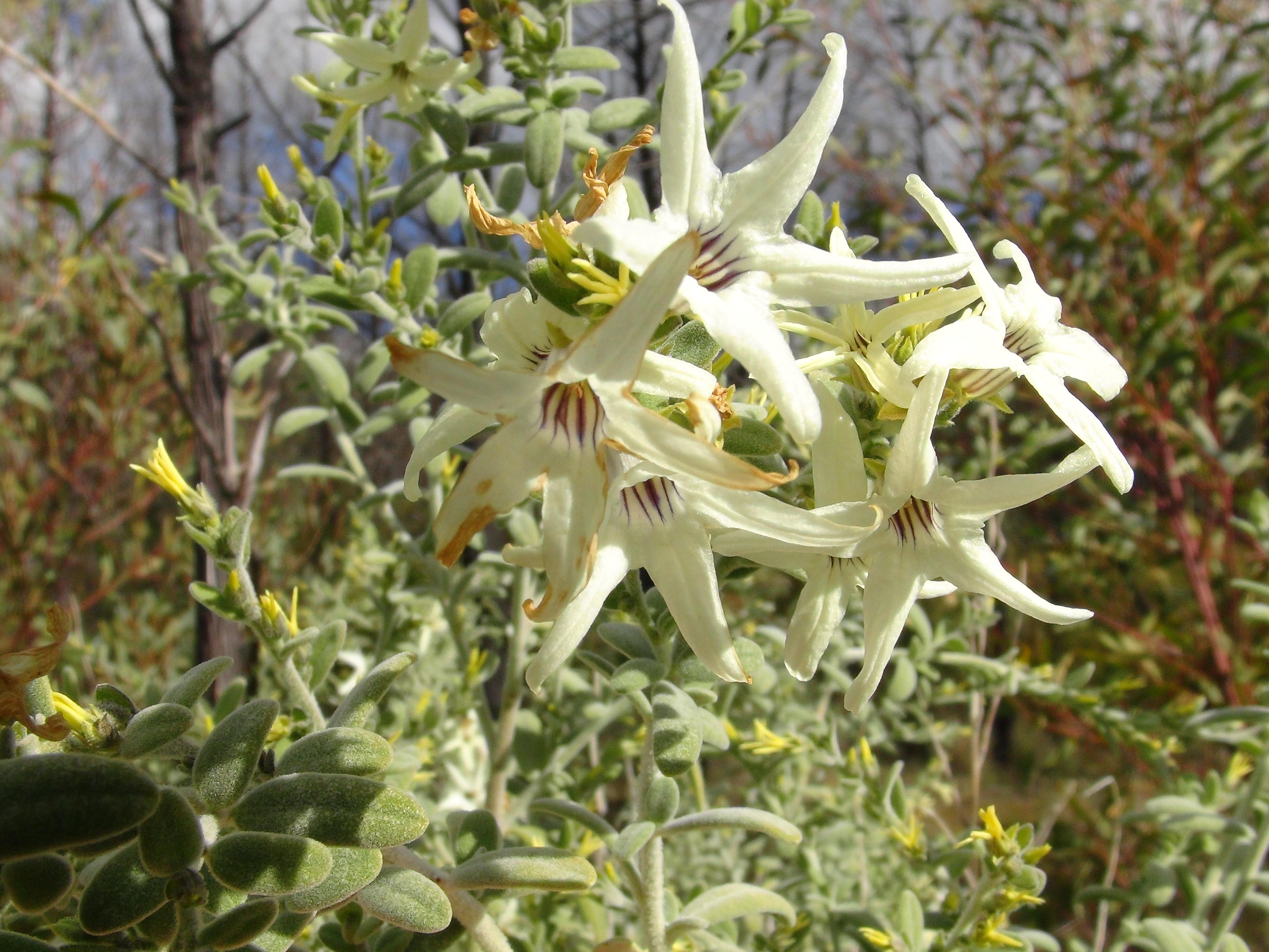 Cyphanthera albicans subsp. notabilis - Warrumbungle National Park - Nueva Gales del Sur, Australia